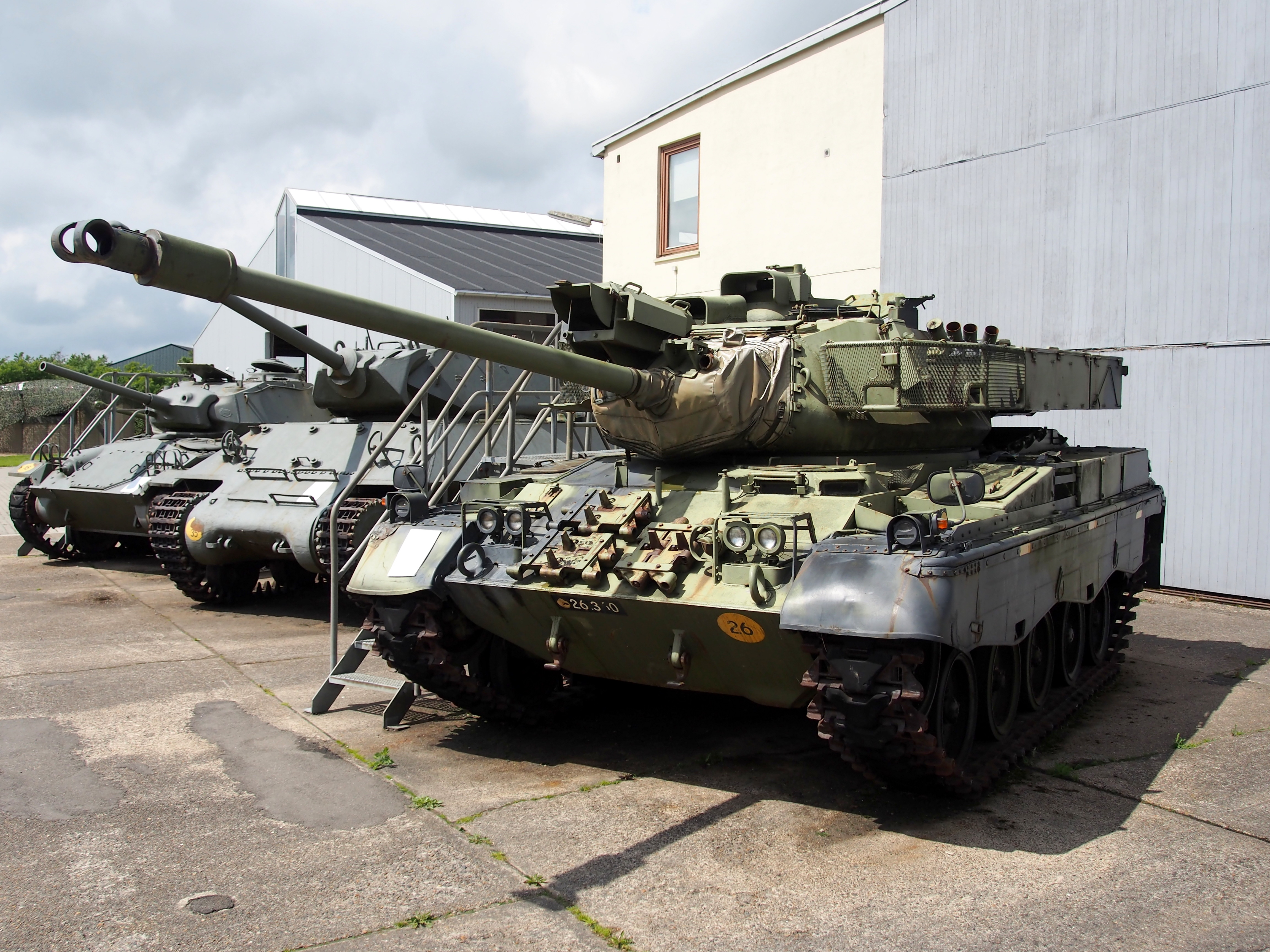 Photographed at Aalborg, Denmark.